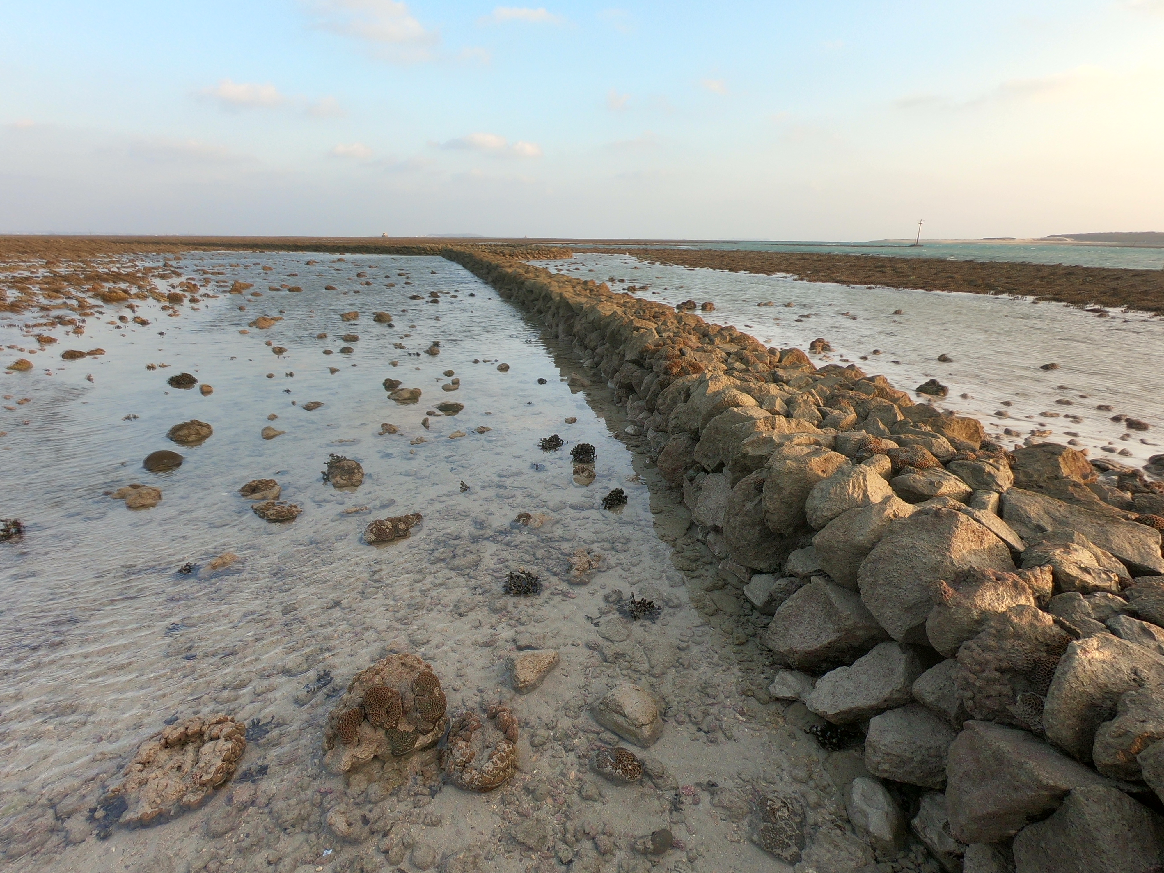 中文（台灣）: 澎湖石滬照片